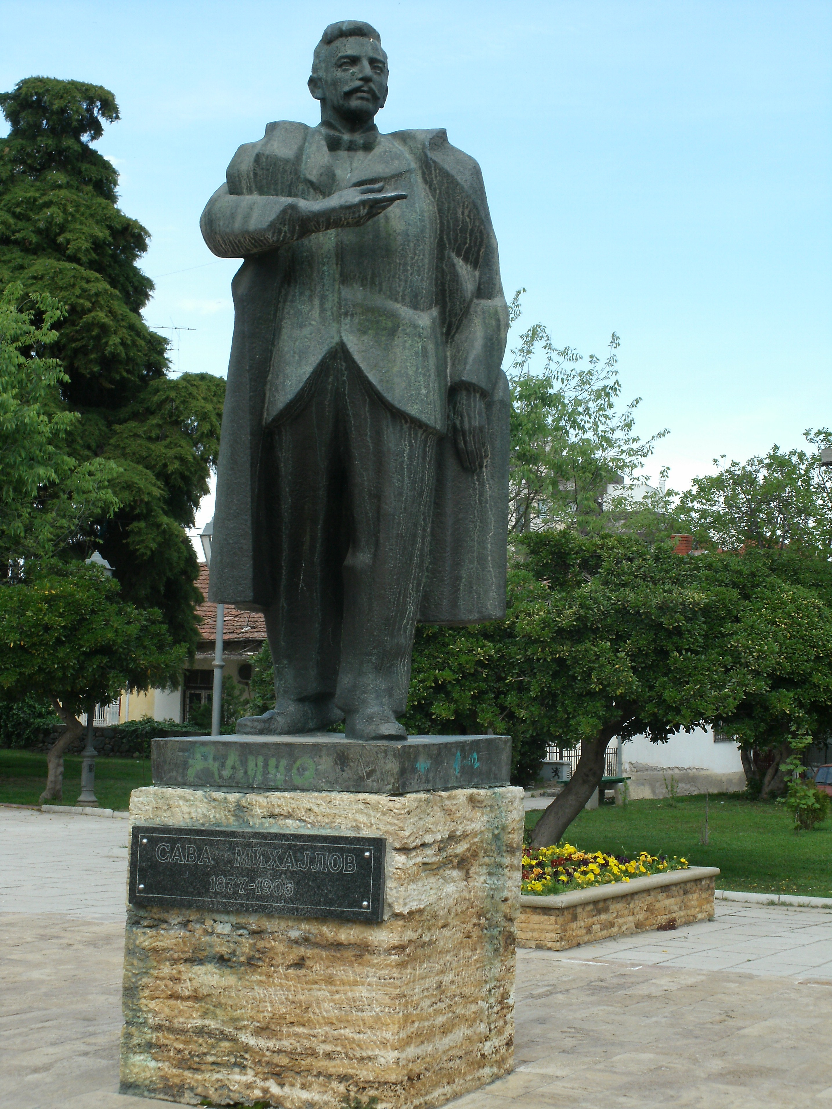 Паметник на Сава Михайлов в Гевгели.